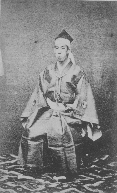 毛利元徳。Mōri Motonori.